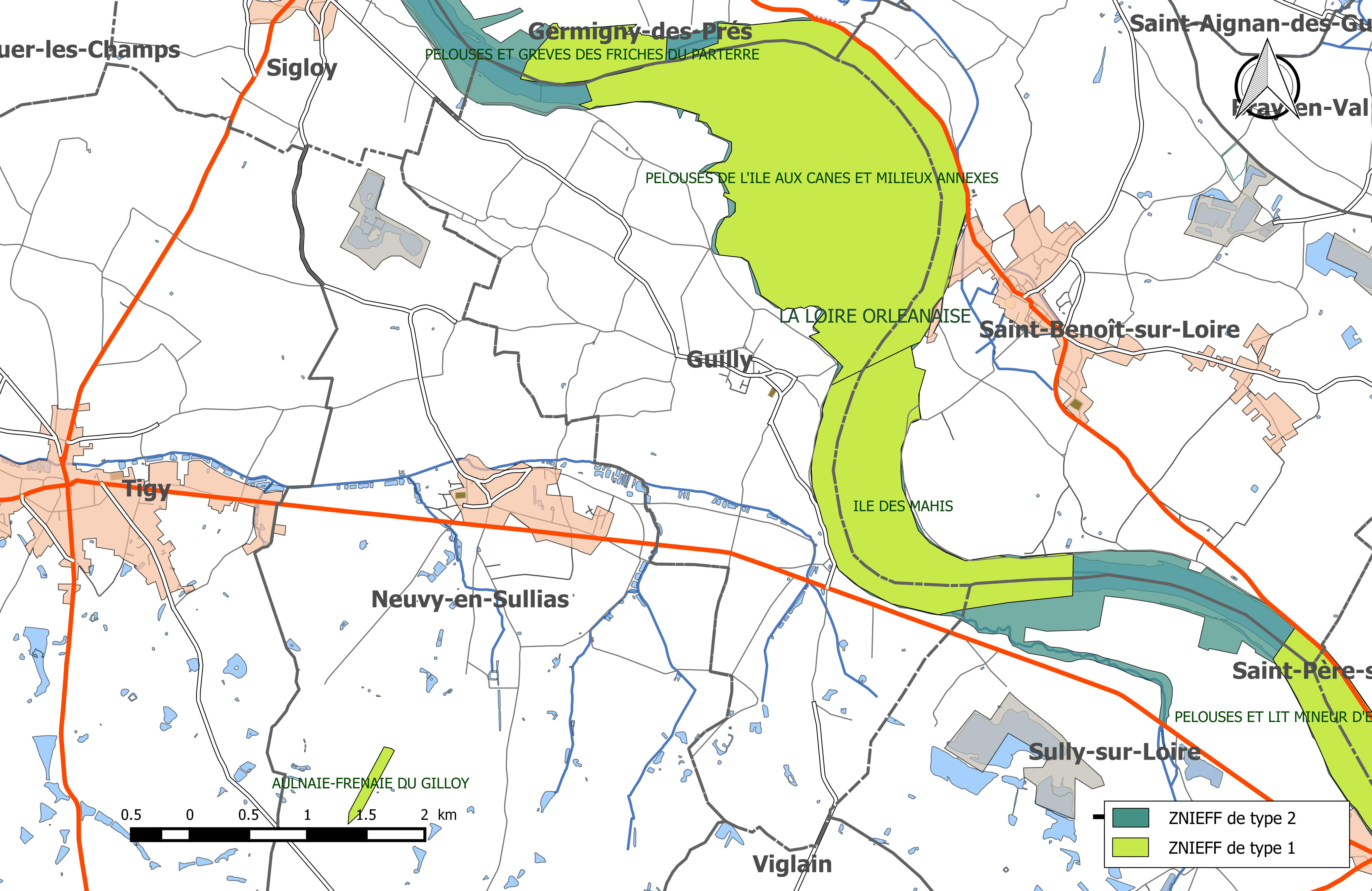 Carte des Zones naturelles d'intérêt écologique faunistique et Floristique (ZNIEFF) de la commune de Guilly (Loiret).